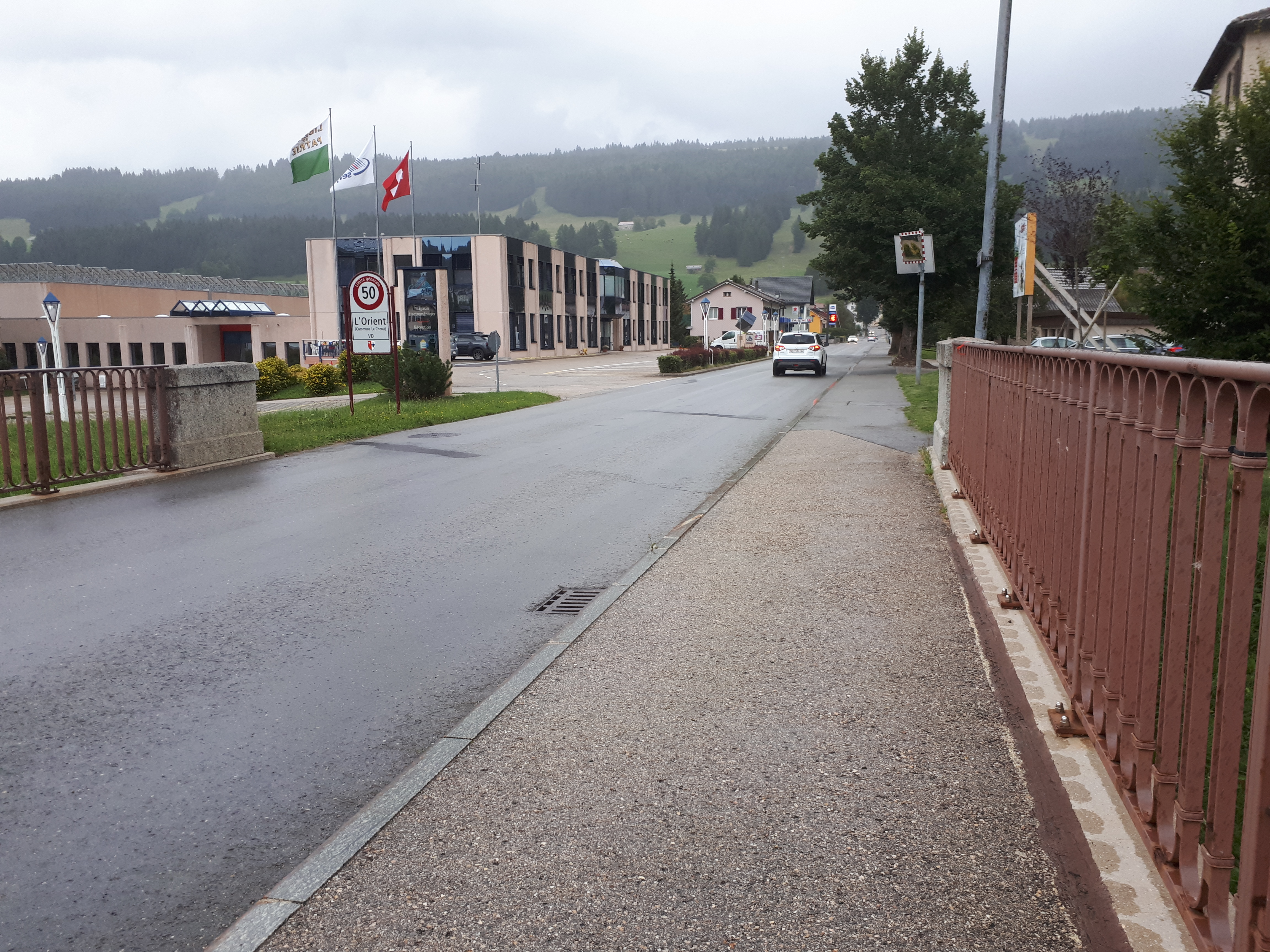 Village de L'Orient (Vaud).